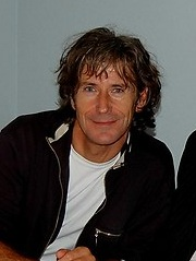 Interview voor Radio Westerwolde na optreden in Geert Teis Stadskanaal.